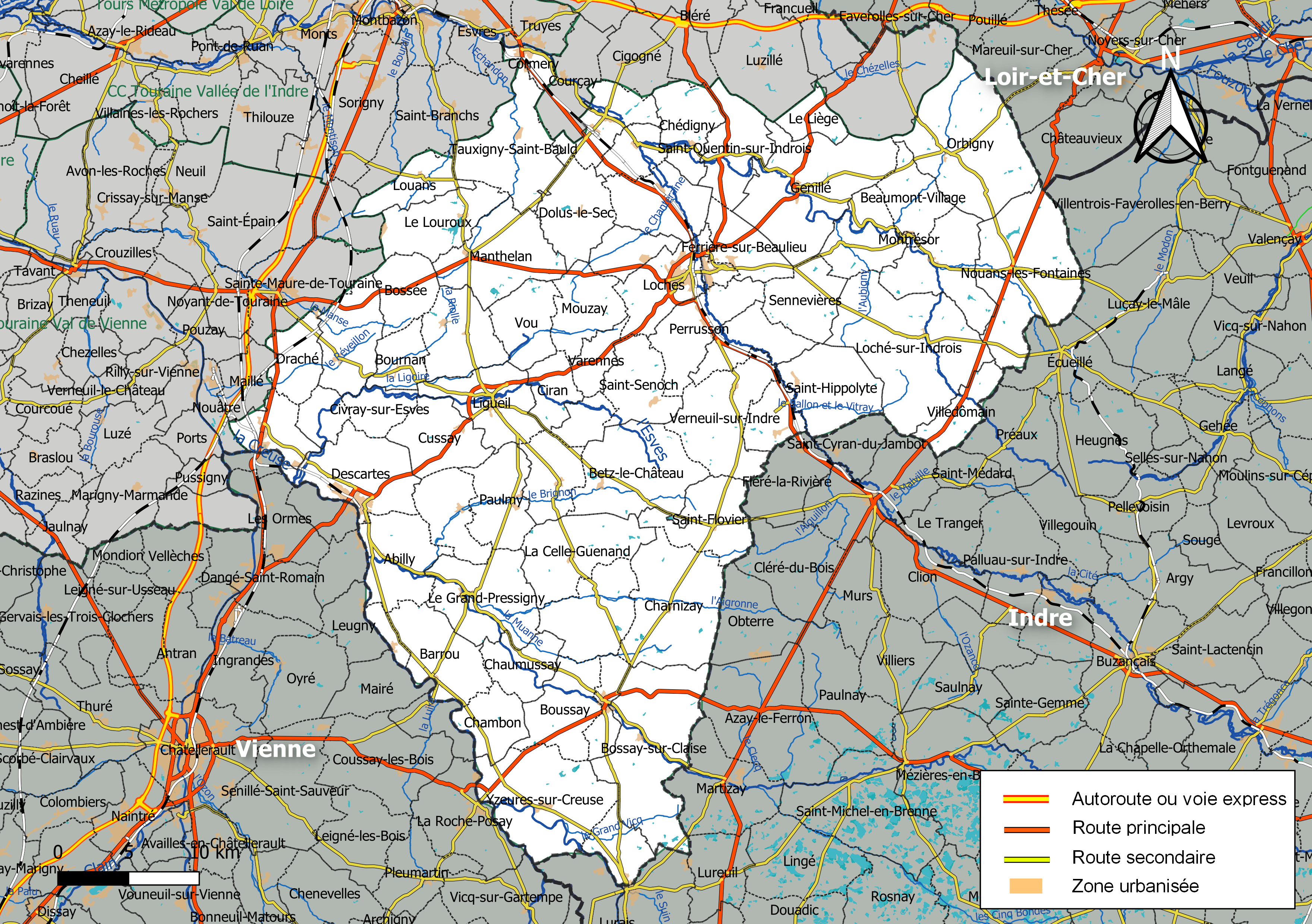 Carte de la communauté de communes Loches Sud Touraine, département d'Indre-et-Loire, France. Composition au 1er janvier 2019.